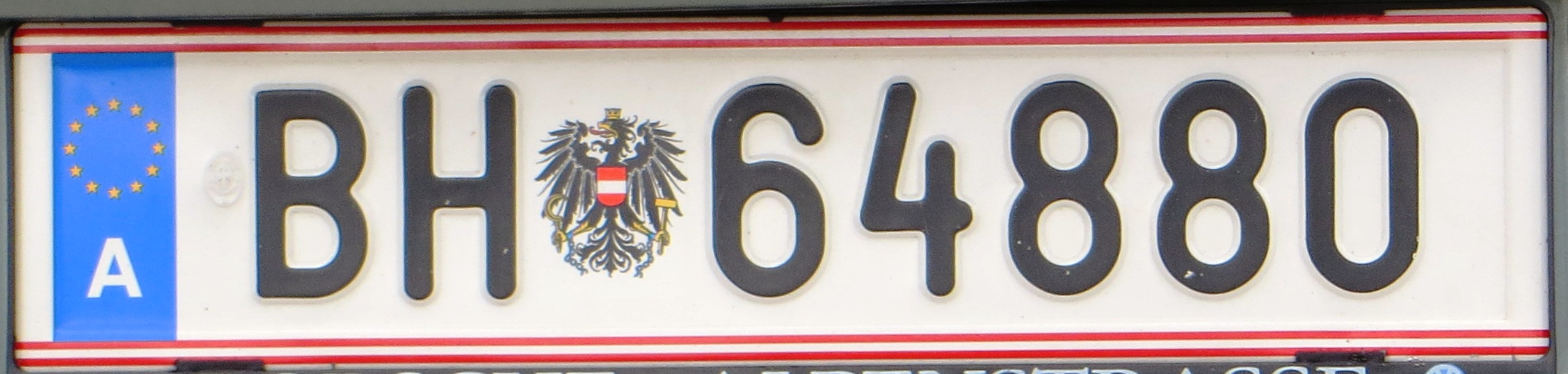 Leger plaat Oostenrijk